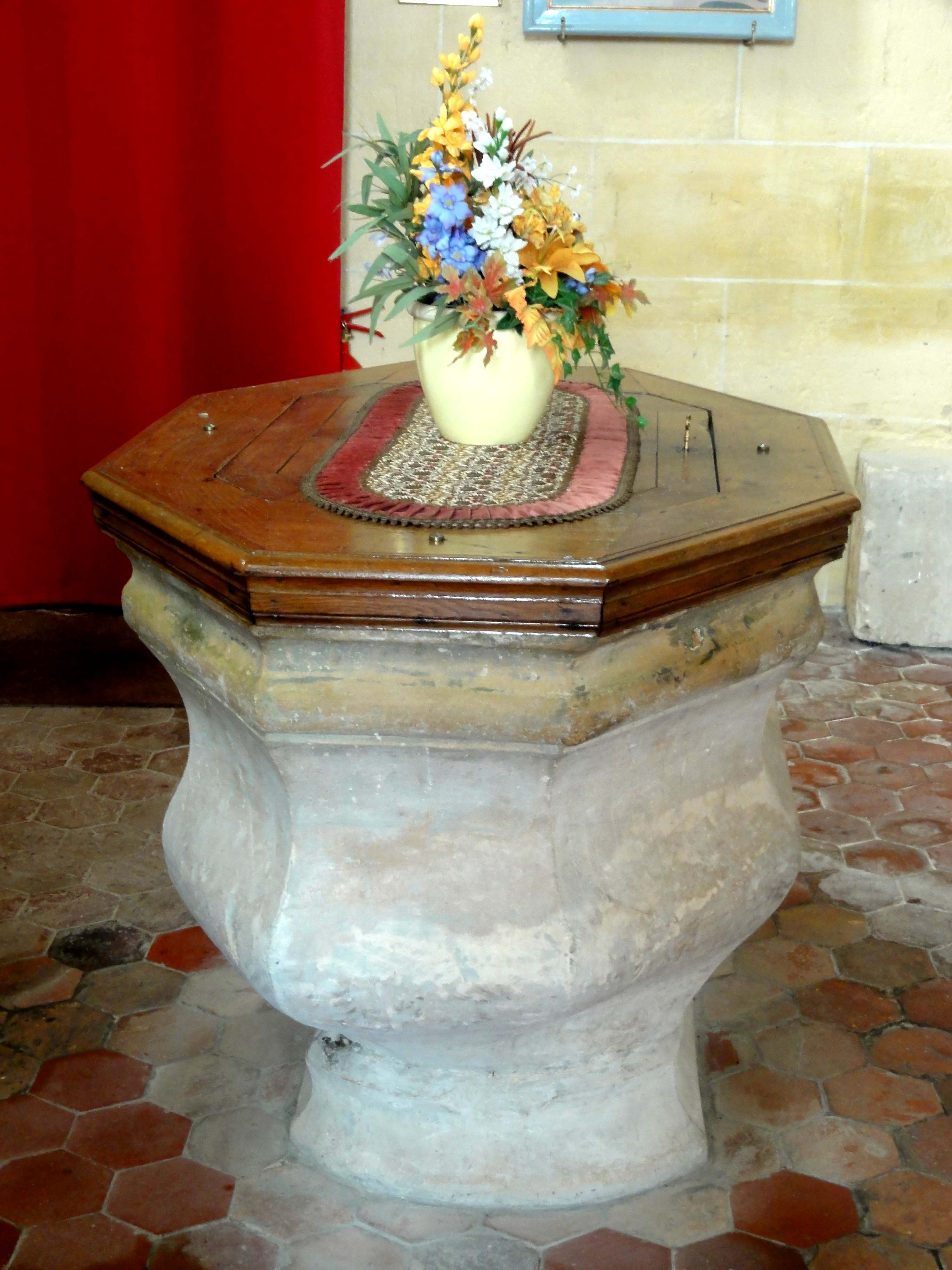 Fonts baptismaux.